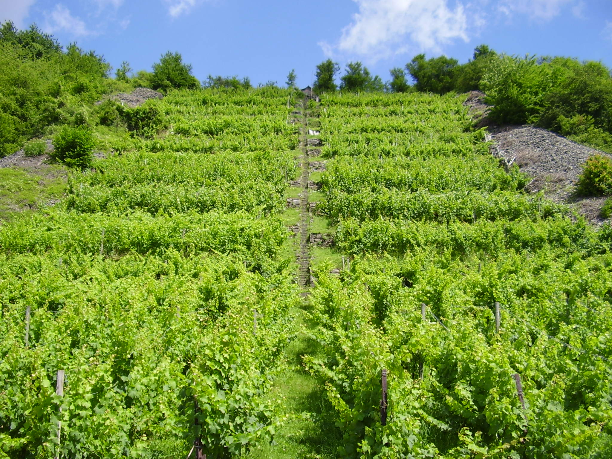 Weinberge an den Ammerlanden zwischen Möckmühl und Züttlingen.